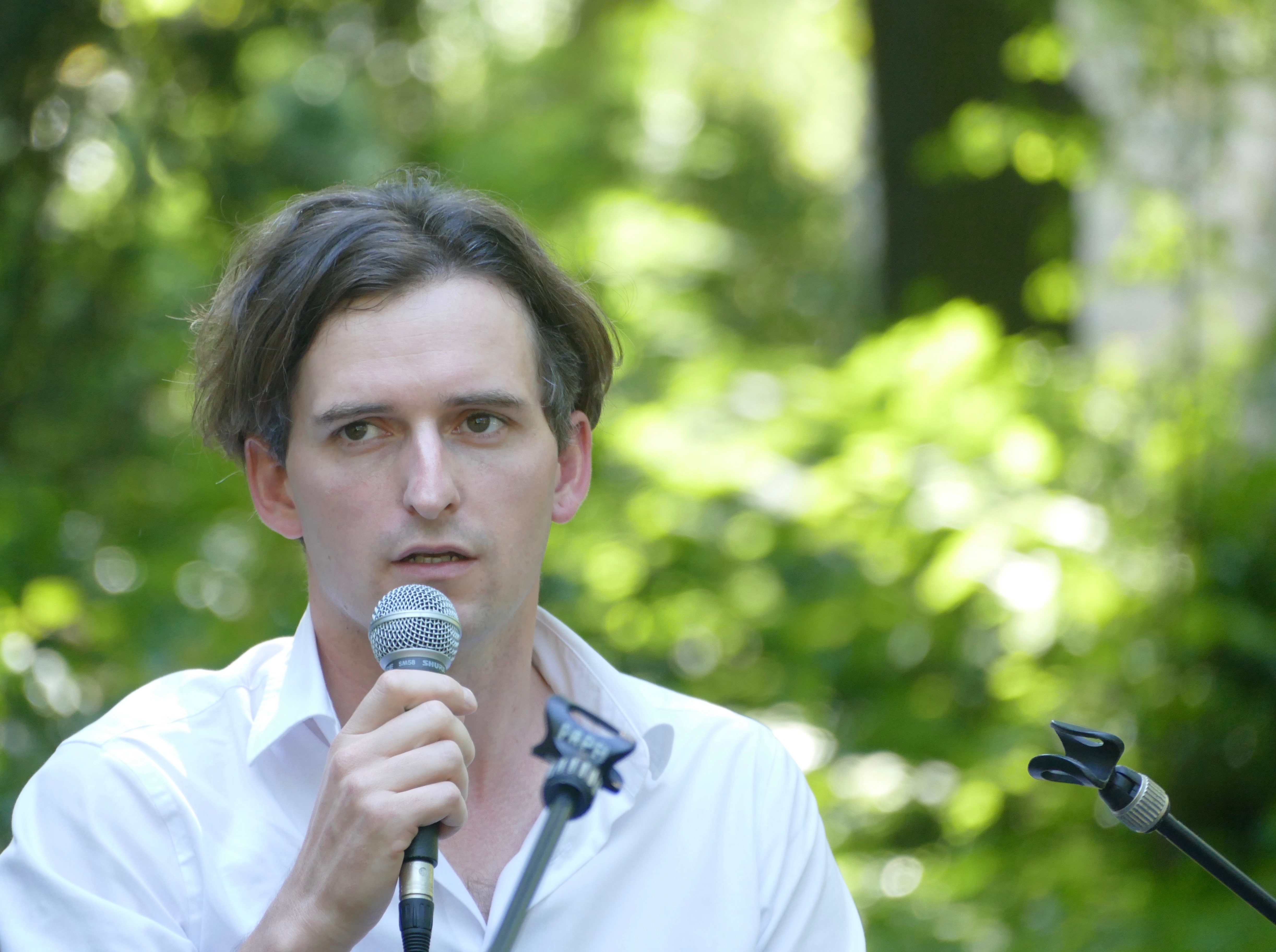 Reinhard Kaiser-Mühlecker stellt auf dem Erlanger Poetenfest 2016 seinen Roman "Fremde Seele, dunkler Wald" vor.